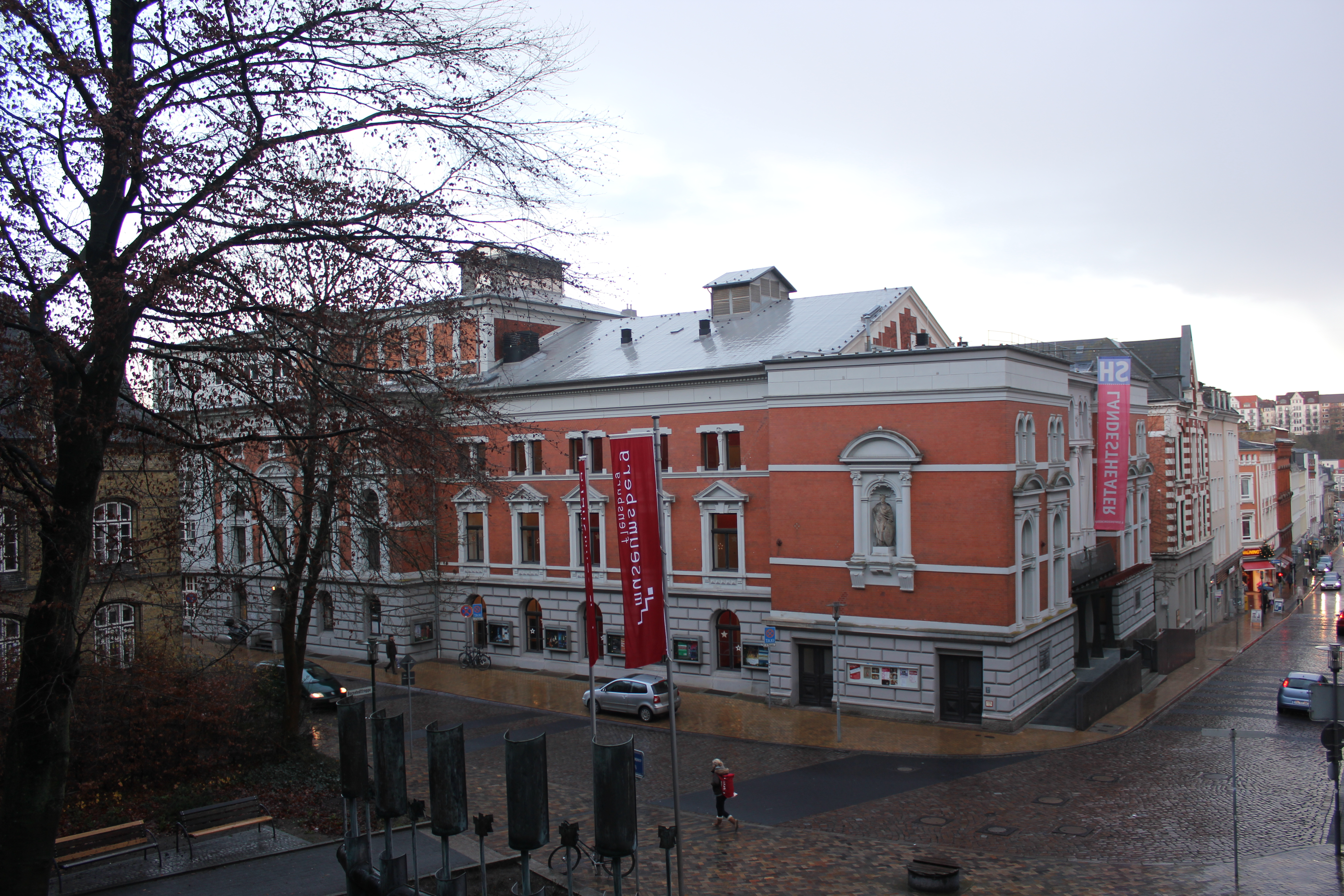 SH Landestheater, Flensburg (Vom Museumsberg)